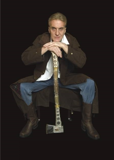 Войчишин В.И. с топором собственного произведения